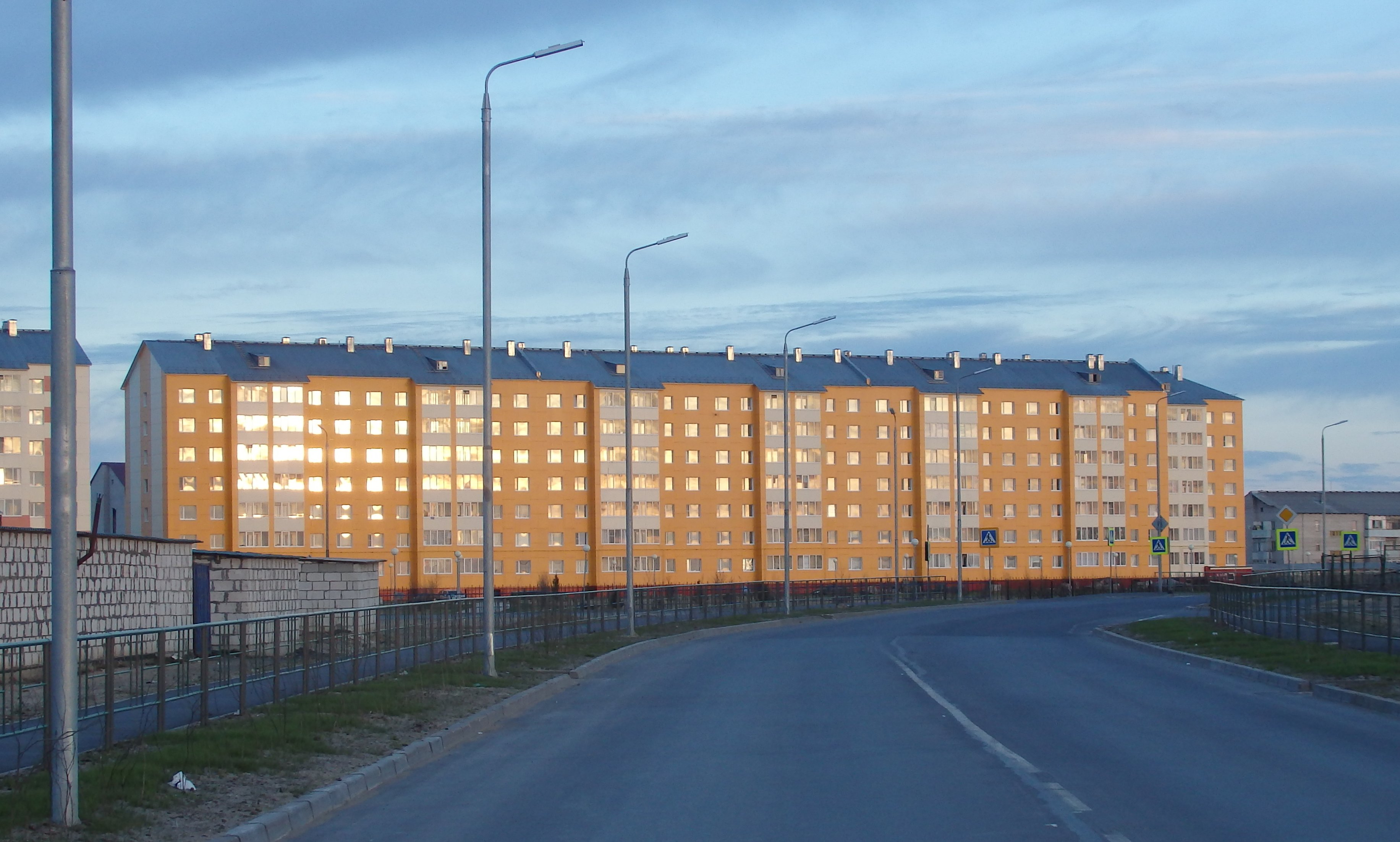 Полярный день. Нарьян-Мар. 21.06.2017, 23:52